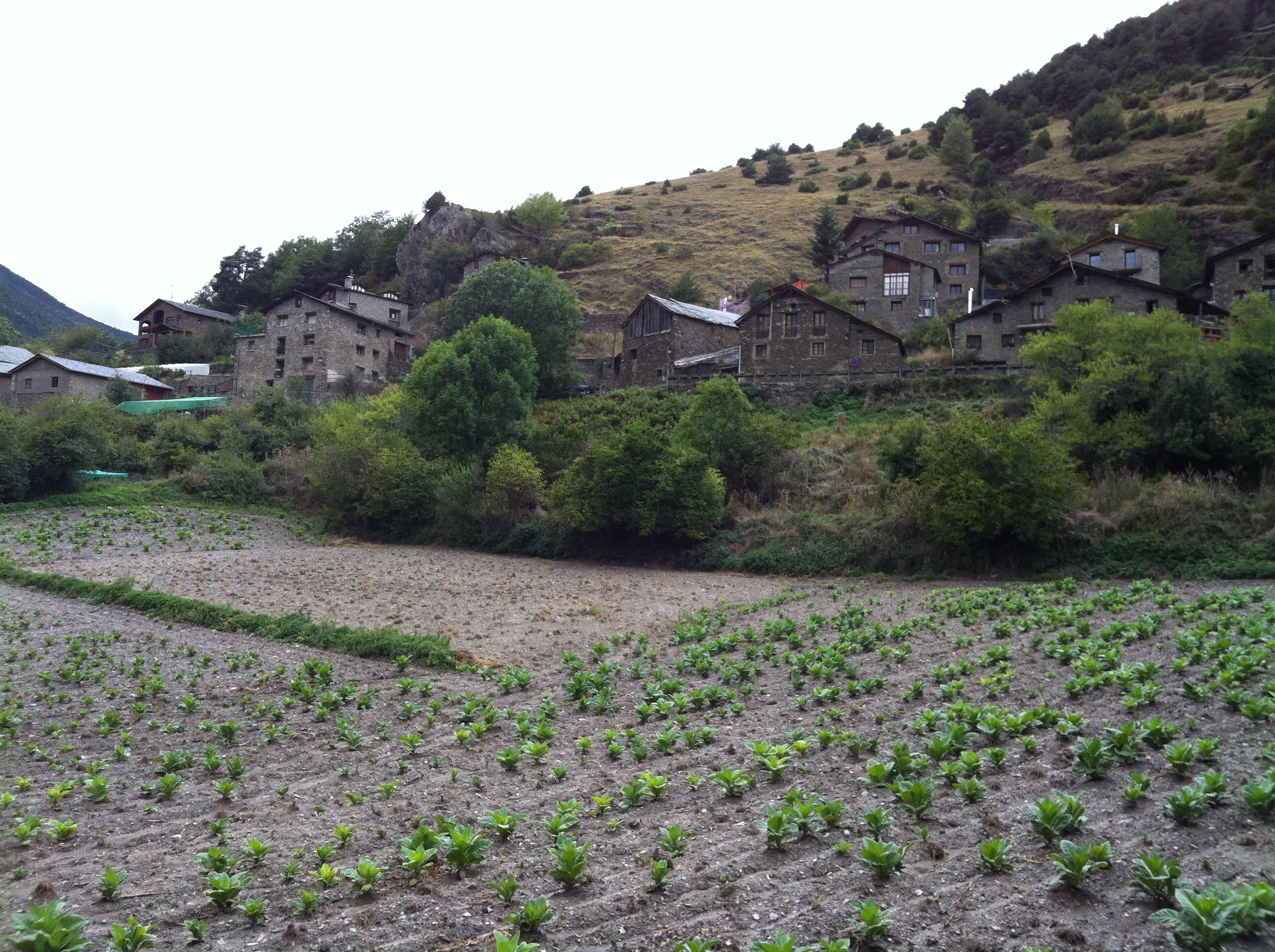 Quart de Sispony